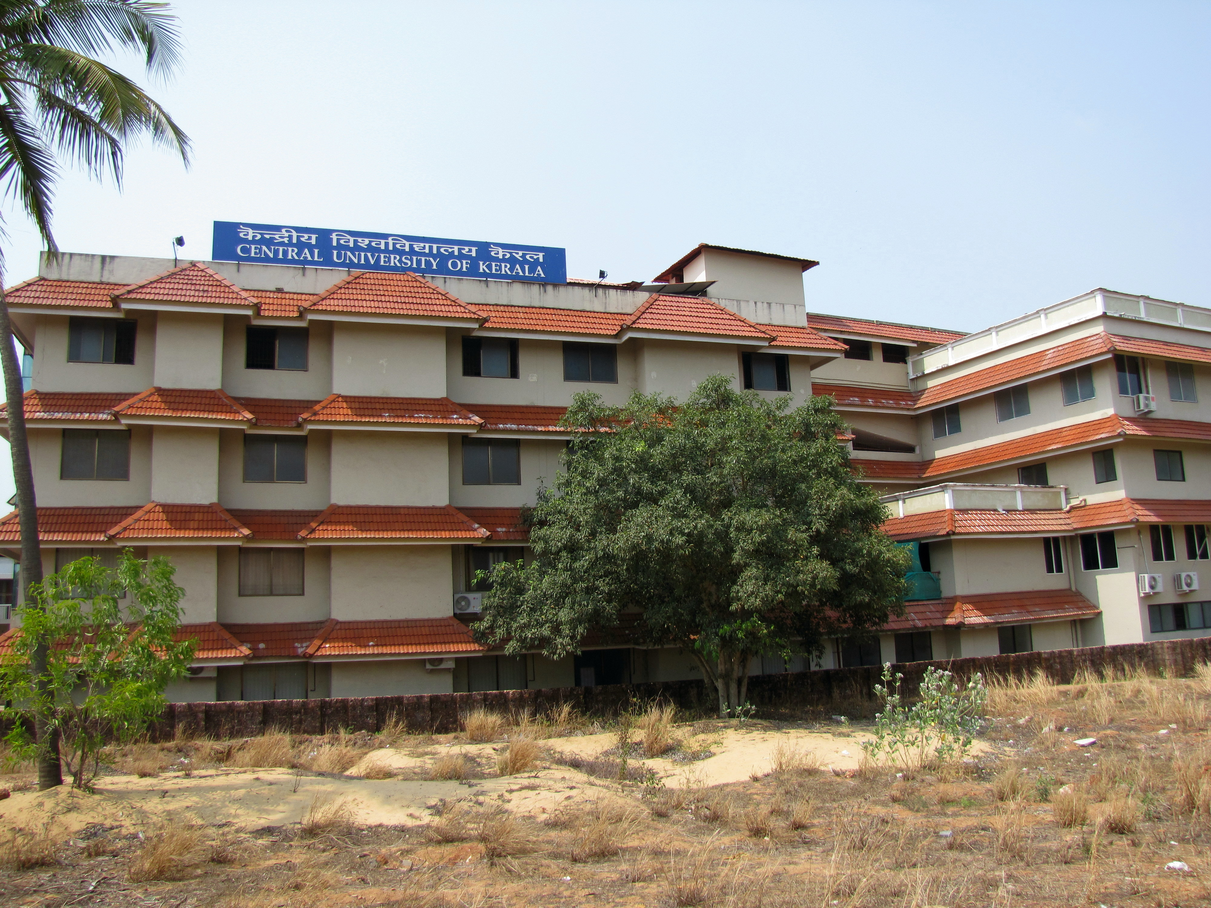 Central University of Kerala at Padannakkad, Kasaragod district